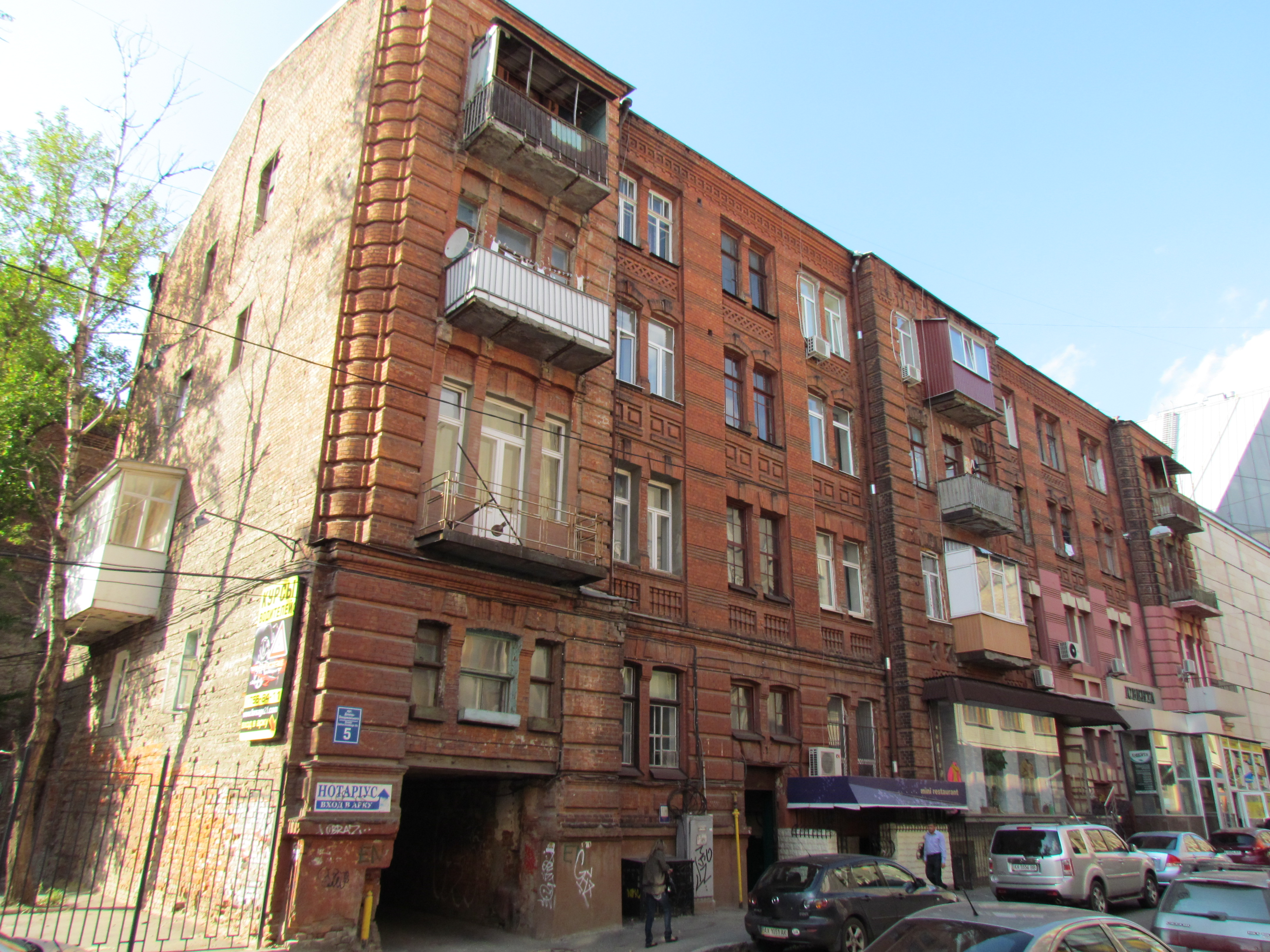 Україна, Харків, вул.Донець-Захаржевського, 5